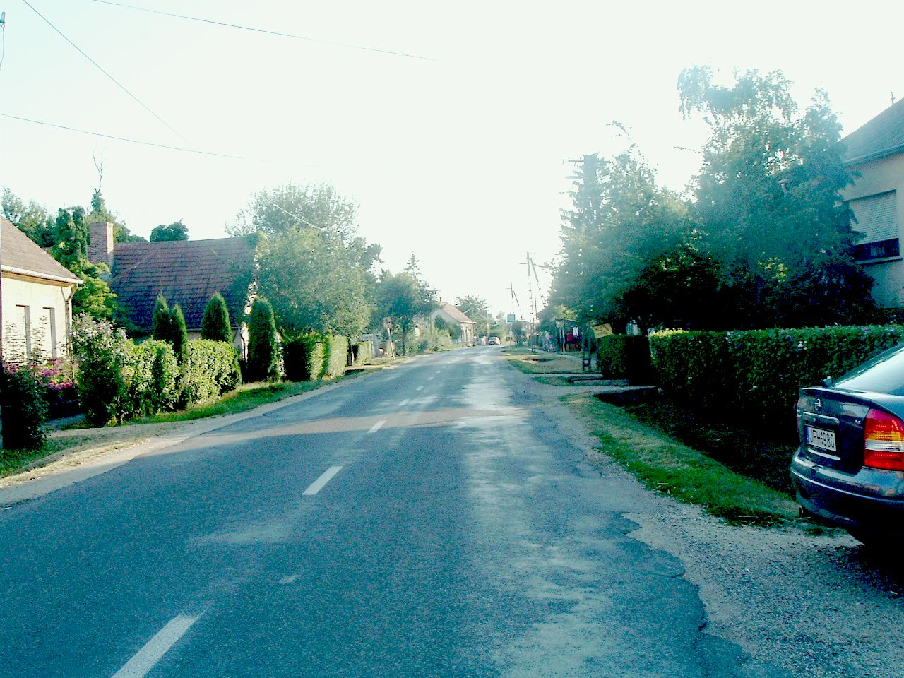 Mesterháza